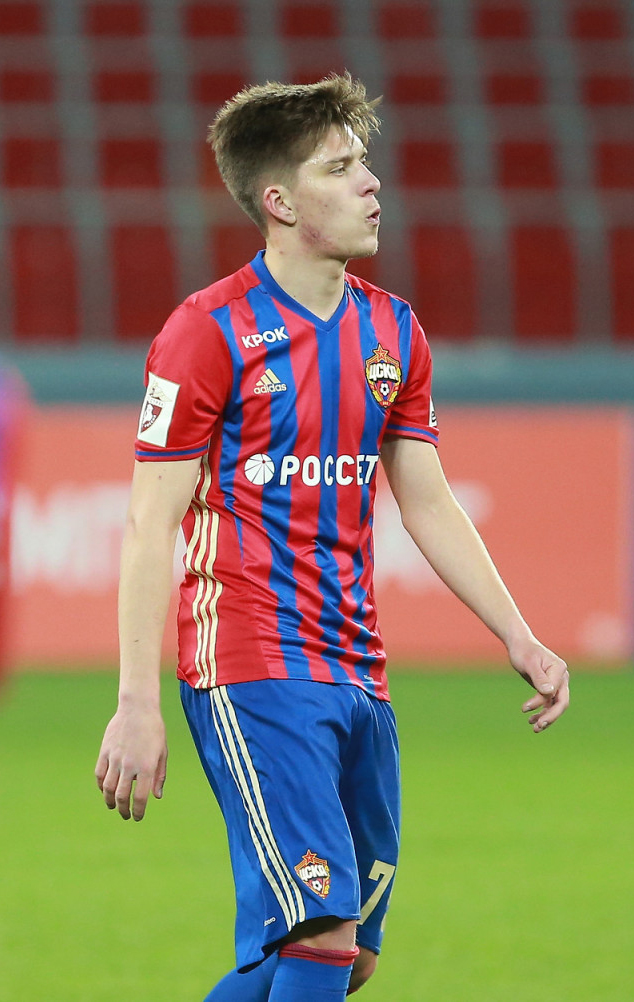 ЦСКА - «Арсенал» Тула